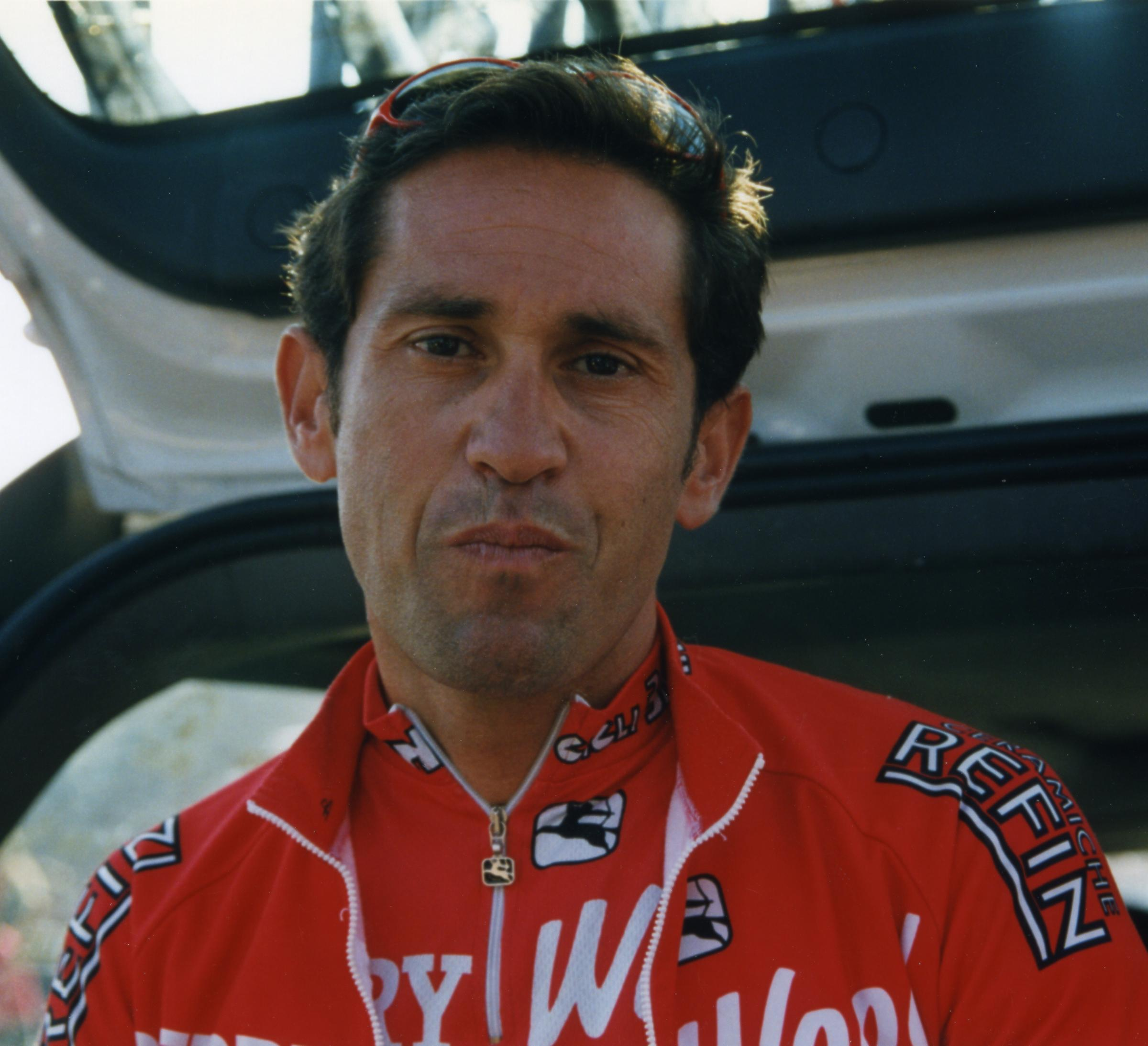 PARIS-TOURS 1997